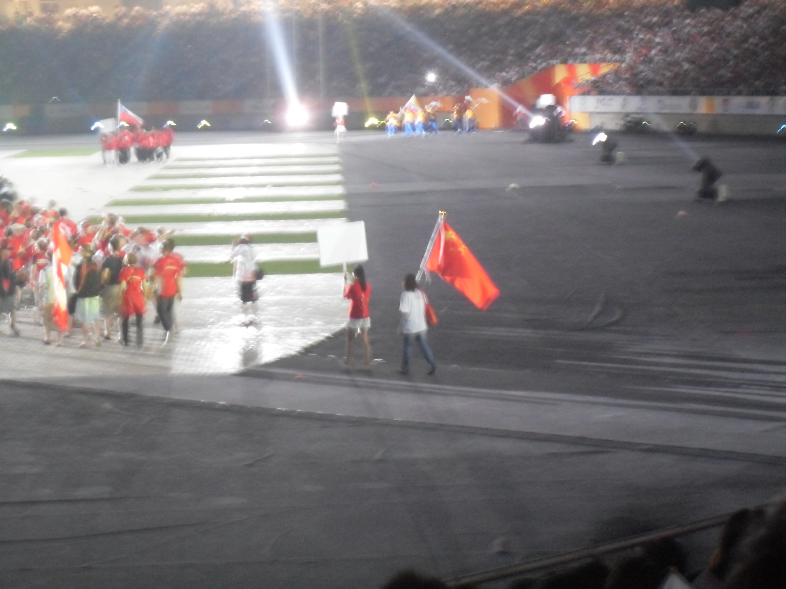 中文（台灣）: 2009世運開幕中國代表團